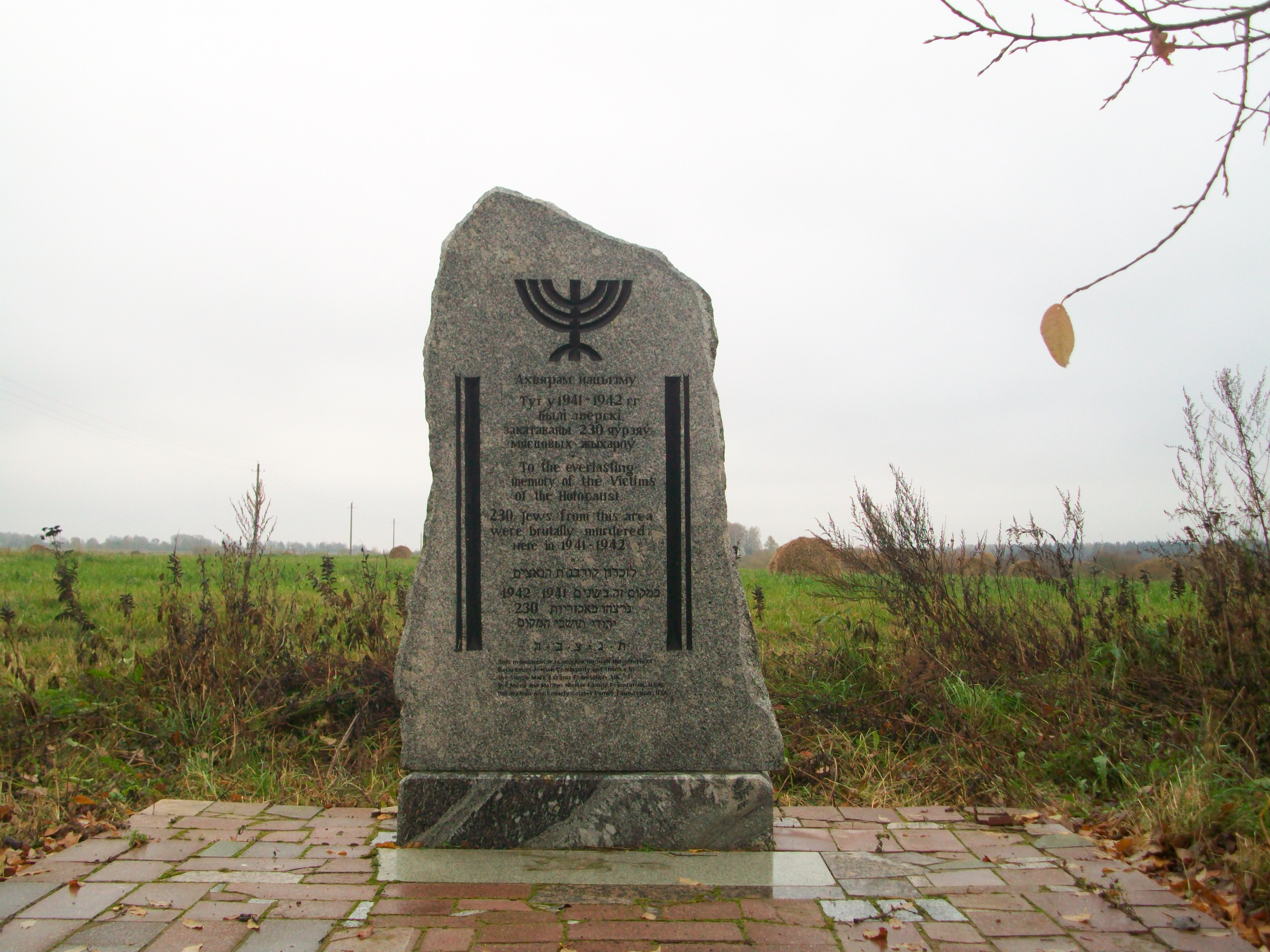 Новый памятник убитым евреям Яновичского гетто у деревни Зайцево возле зернотока на Вальповском поле.